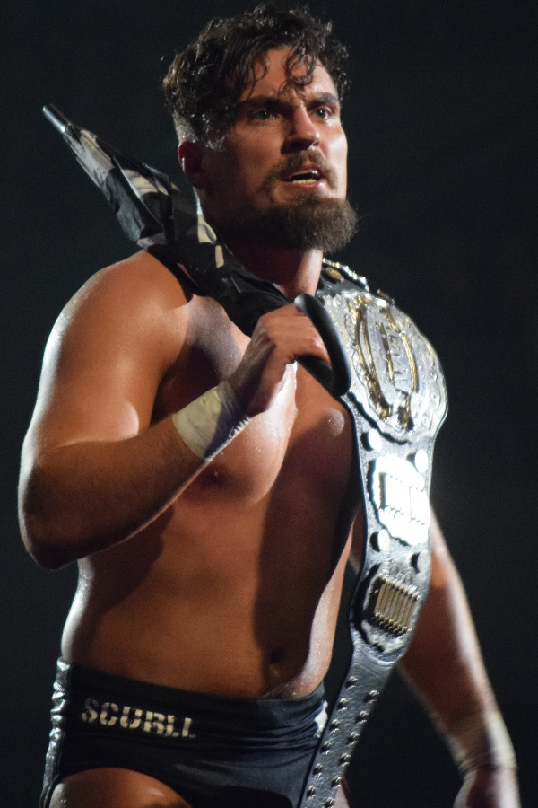 2017年11月5日 大阪府立体育会館「POWER STRUGGLE」 マーティ・スカル